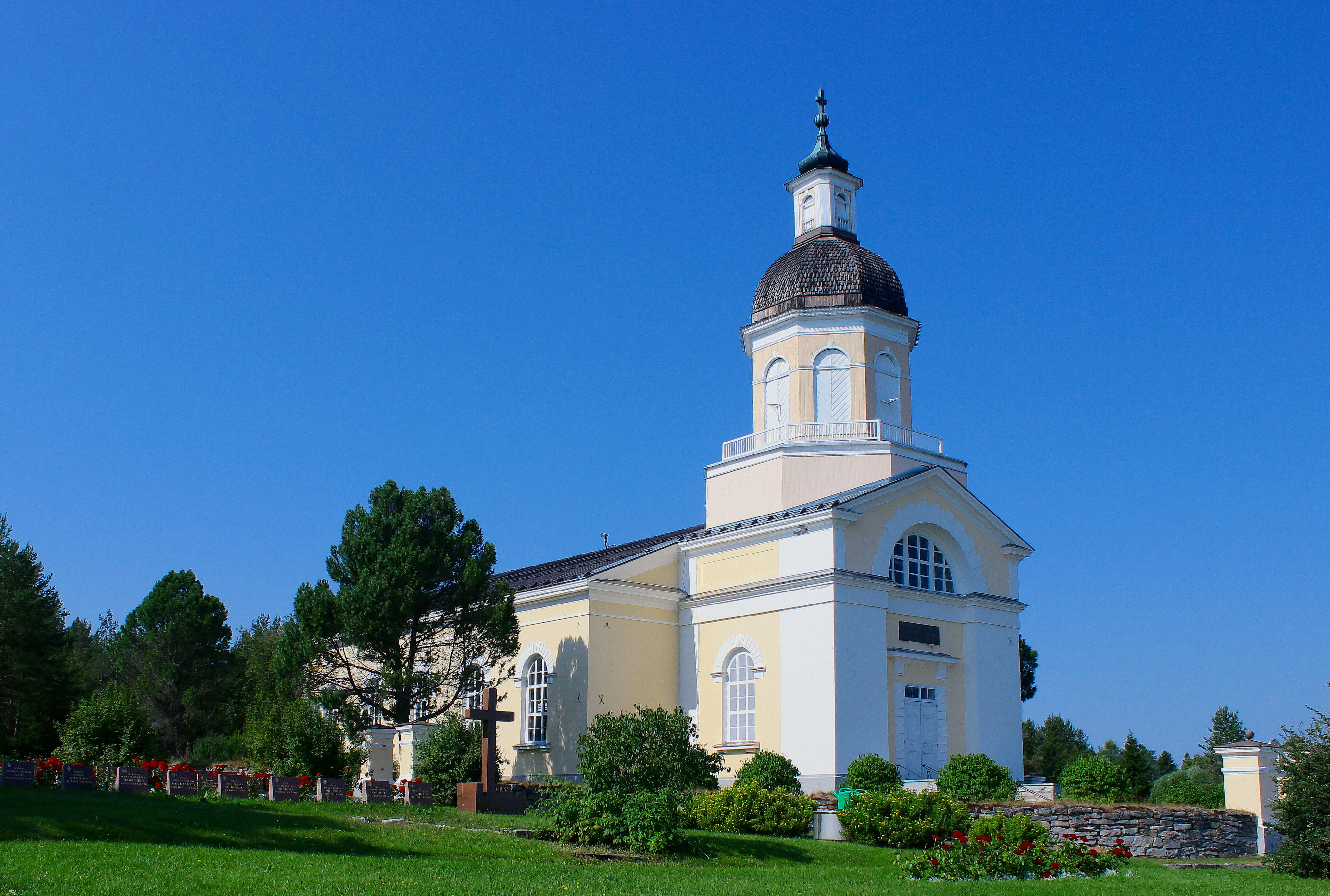 Keminmaan uusi kirkko kesällä 2014.